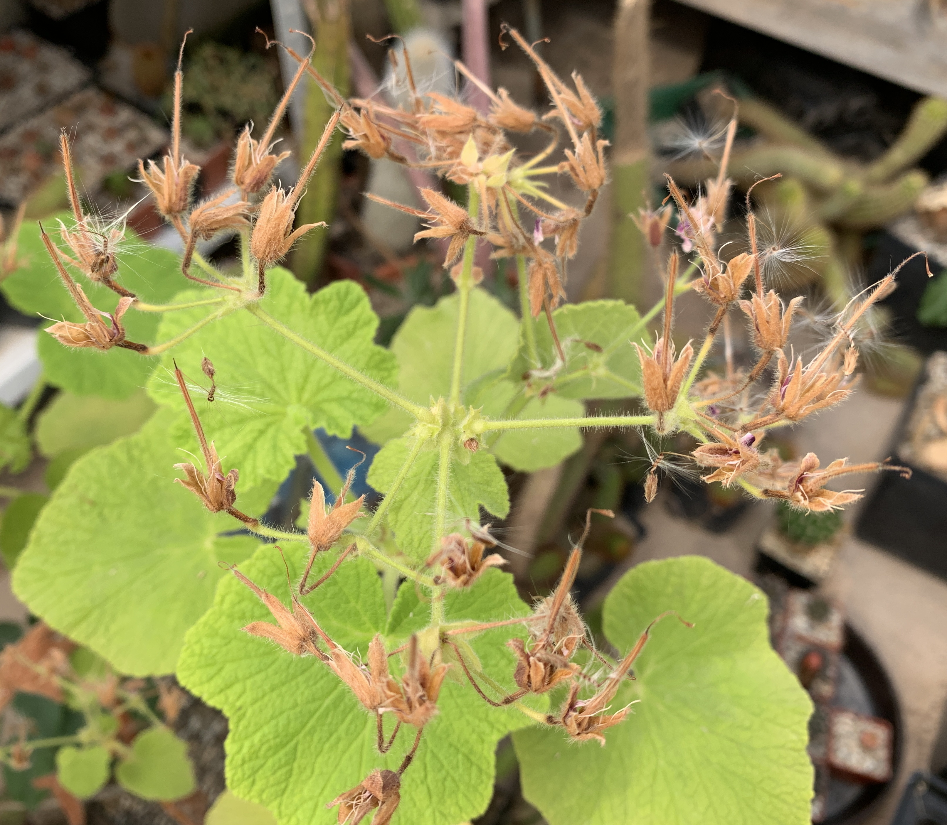 Fruchtstand von Pelargonium papilionaceum in Kultur (ohne Samen)